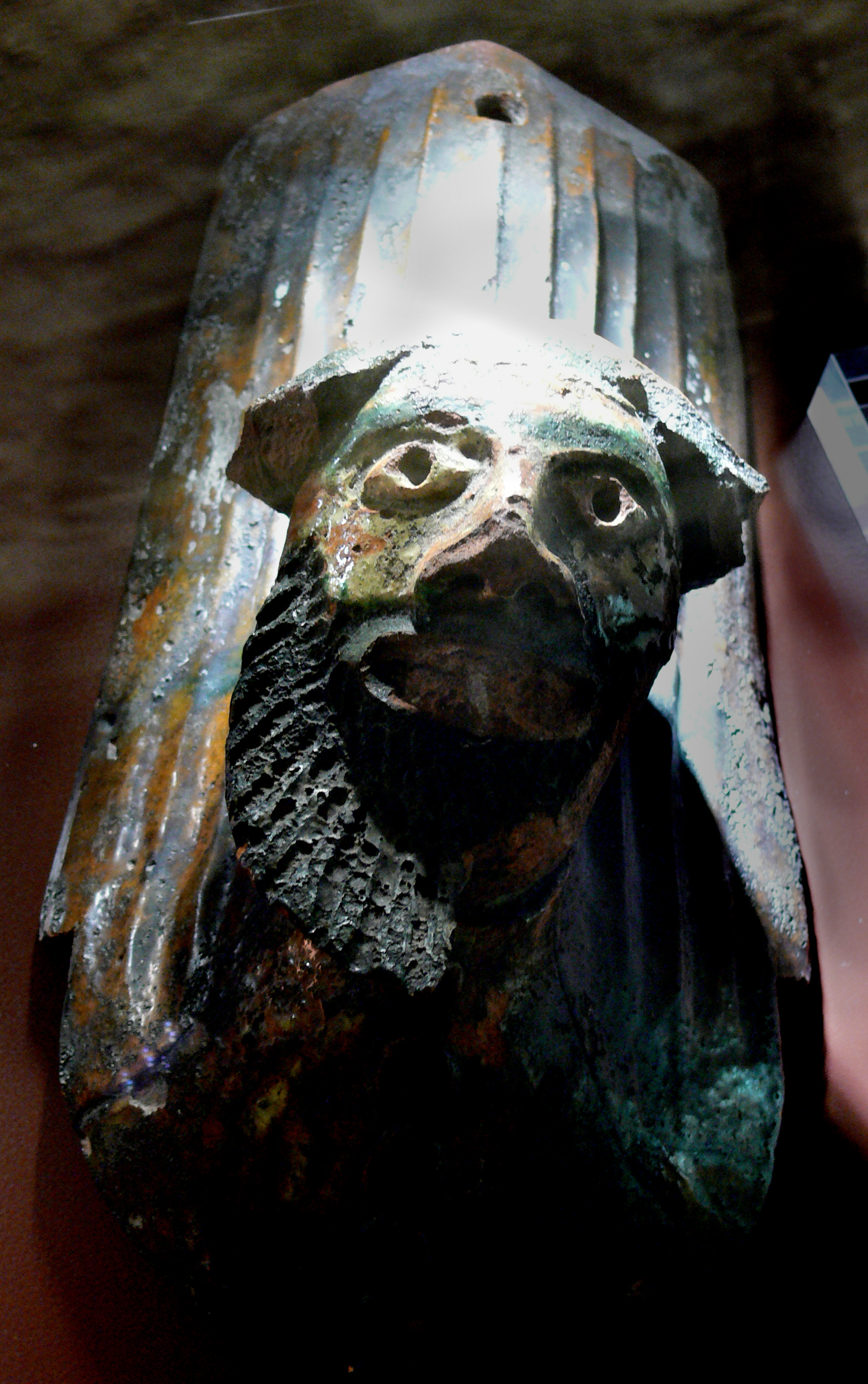 Museum Humpisquartier, Ravensburg Schmähziegel gegen Juden vom Grünen Turm in Ravensburg, 15. Jahrhundert Humpis-Quartier Native nameMuseum Humpis-QuartierLocationRavensburg, GermanyCoordinates47° 46′ 49.8″ N, 9° 36′ 57.24″ E Established2009Web page control : Q1637298 VIAF: 128828875 LCCN: nb2007020847 GND: 4565586-8 WorldCat institution QS:P195,Q1637298